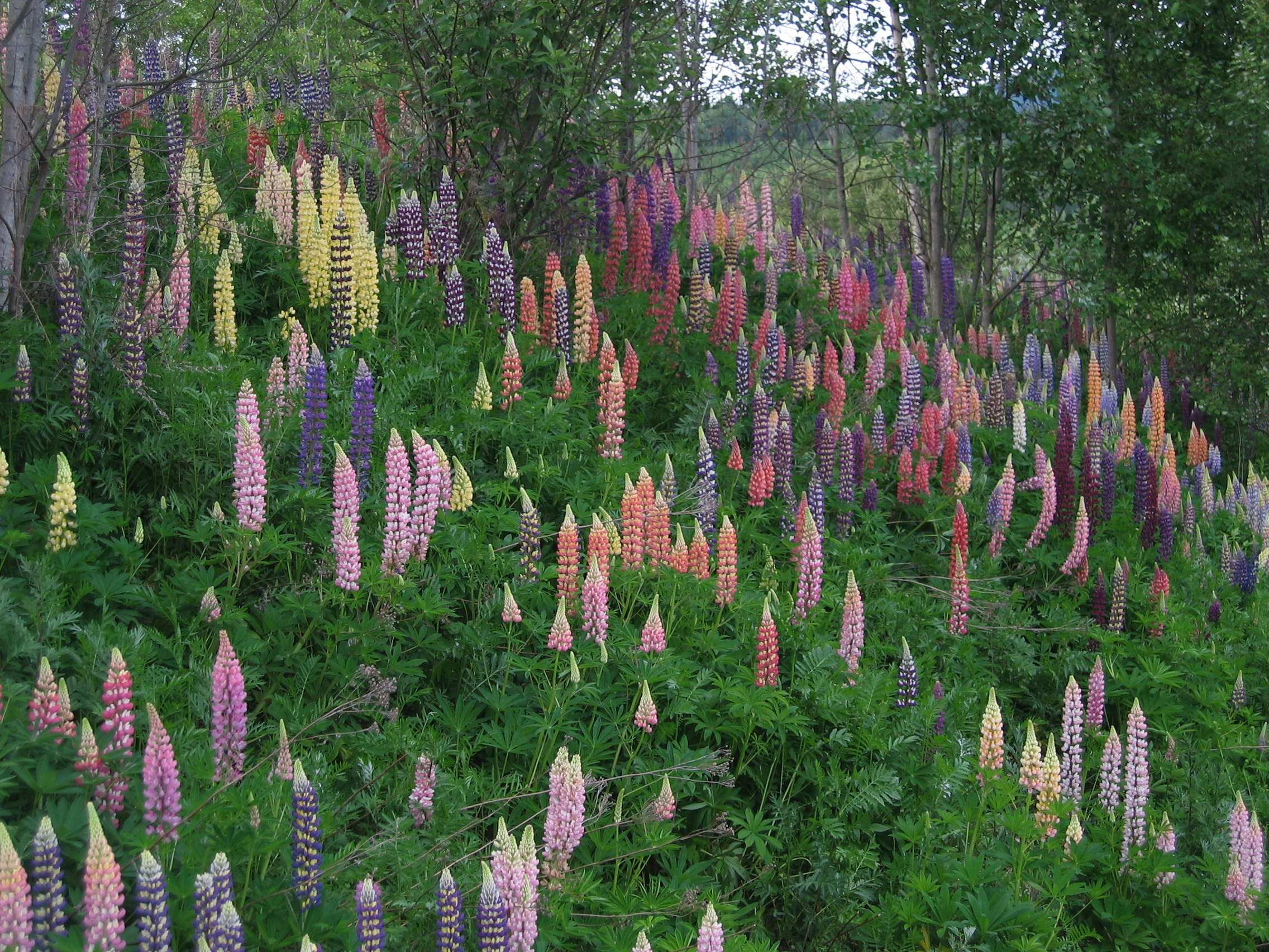 Eng av lupiner